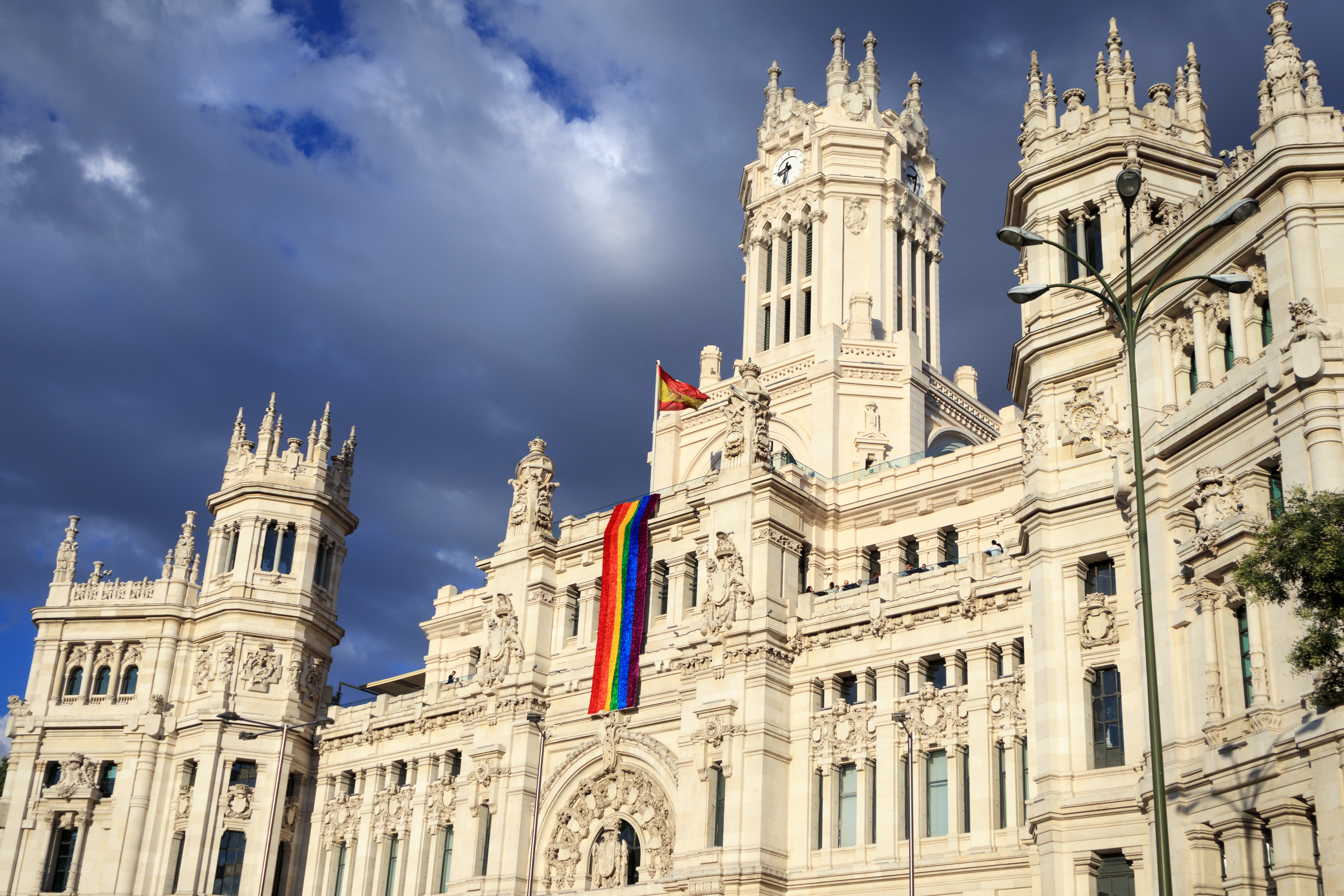 Bandera arcoiris en la fachada del Palacio de Correos, Madrid.